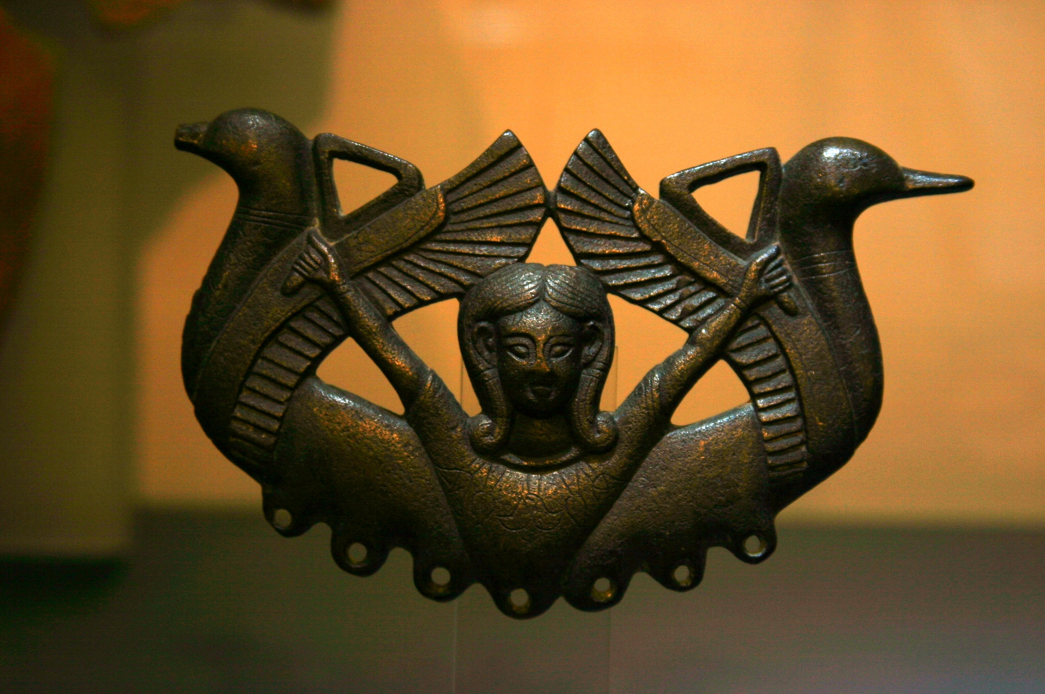 Astarte